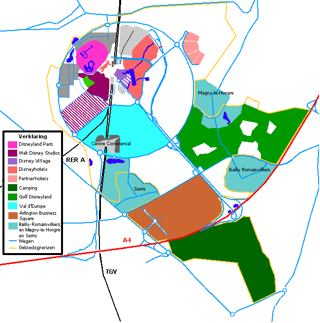 Plattegrond van het domein van Disneyland Resort Paris.